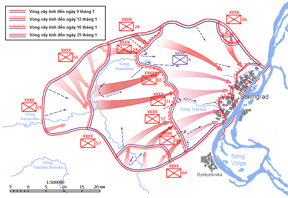 Diễn biến giai đoạn cuối của chiến dịch "Cái Vòng" (10-1 đến 2-2-1943), Phương diện quân Sông Đông (Liên Xô) bao vây và tiêu diệt Tập đoàn quân 6 (Đức Quốc xã)